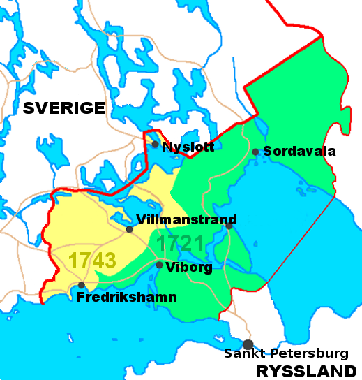 Svensk version av Altfinnland.png